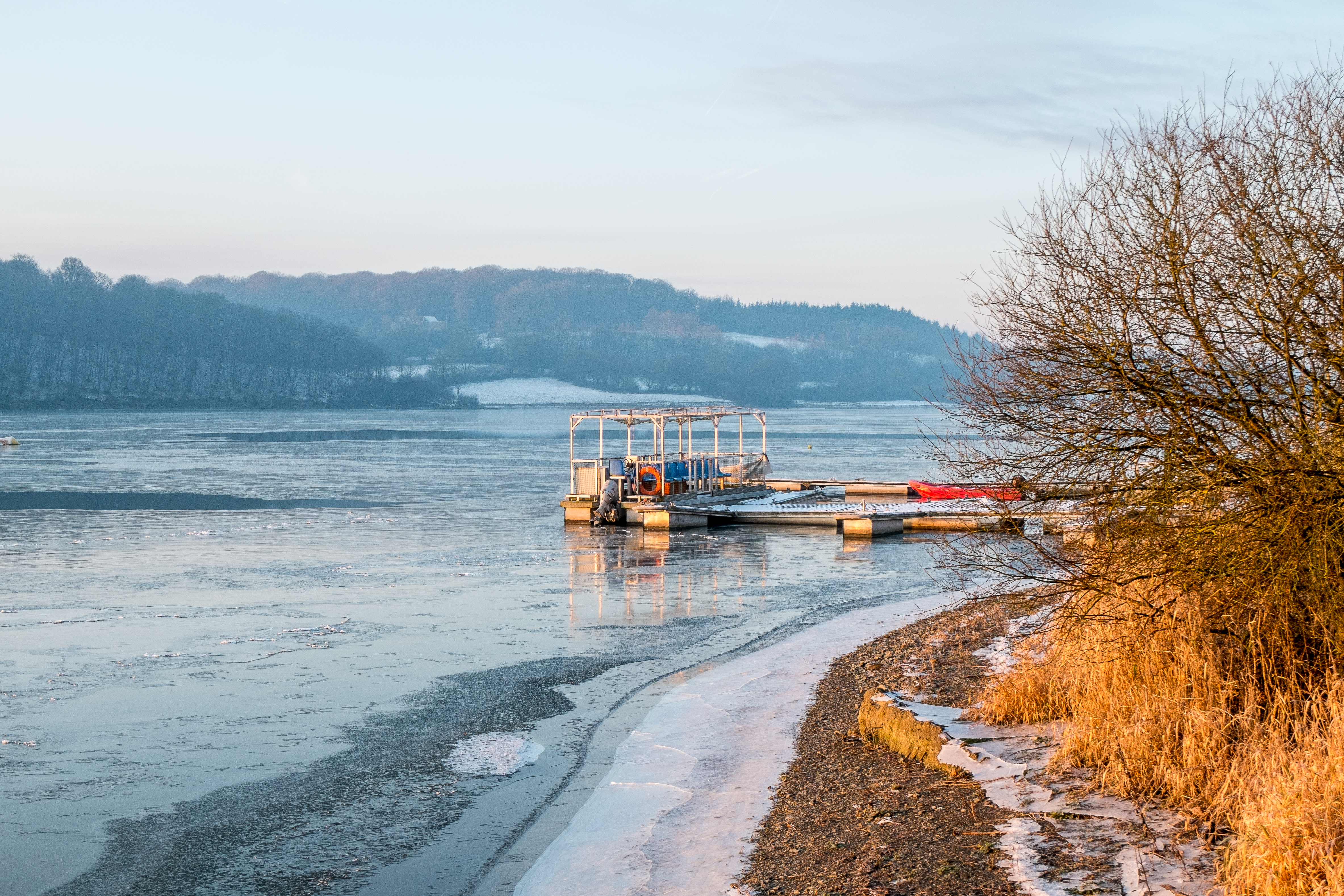 Le lac du ValJoly étant plus long que large s'englace assez aisément le long de ses berges aux endroits favorables. Et pour peu que les conditions de température (entre autres) soient réunies comme ce fut brièvement le cas en cette mi-janvier.